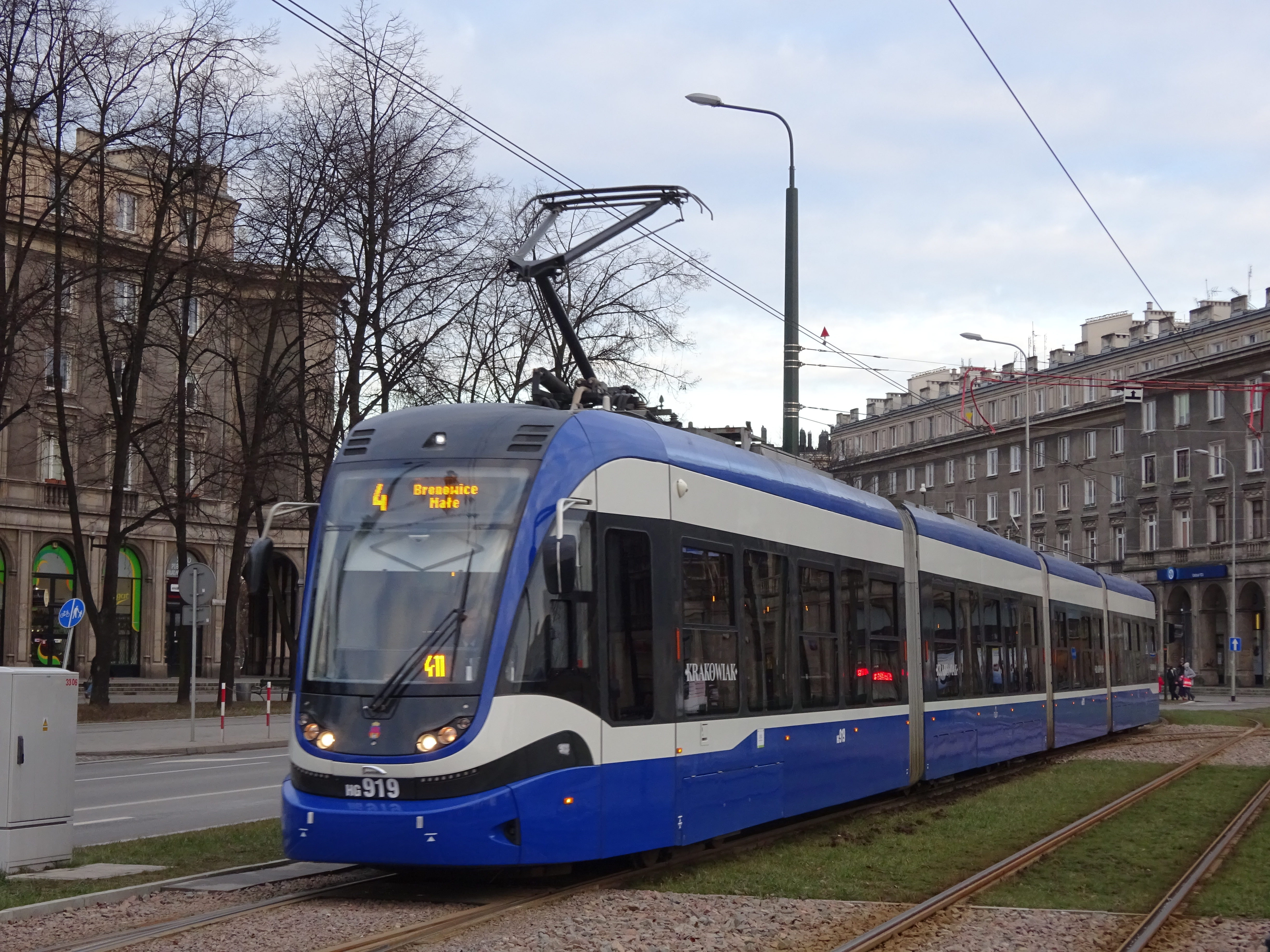 Pesa Krakowiak 2014N - Tramwaj w Krakowie